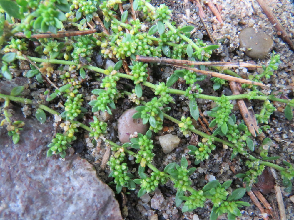 Kahles Bruchkraut (Herniaria glabra) im Schwetzinger Hardt